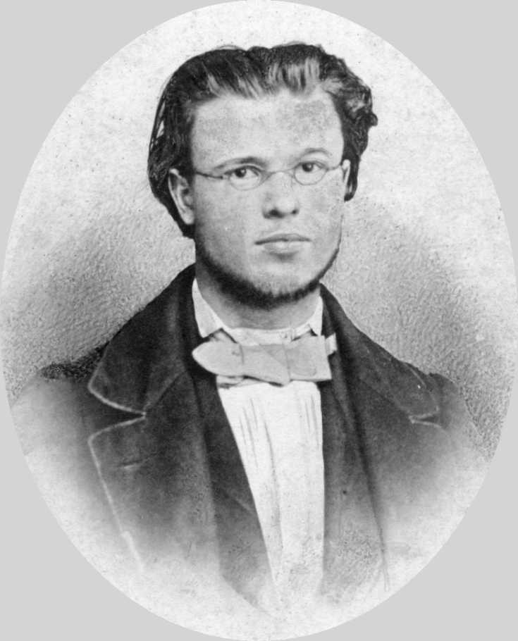 Porträt der Architekt Hermann Rudolf Gauss (1835-1868)